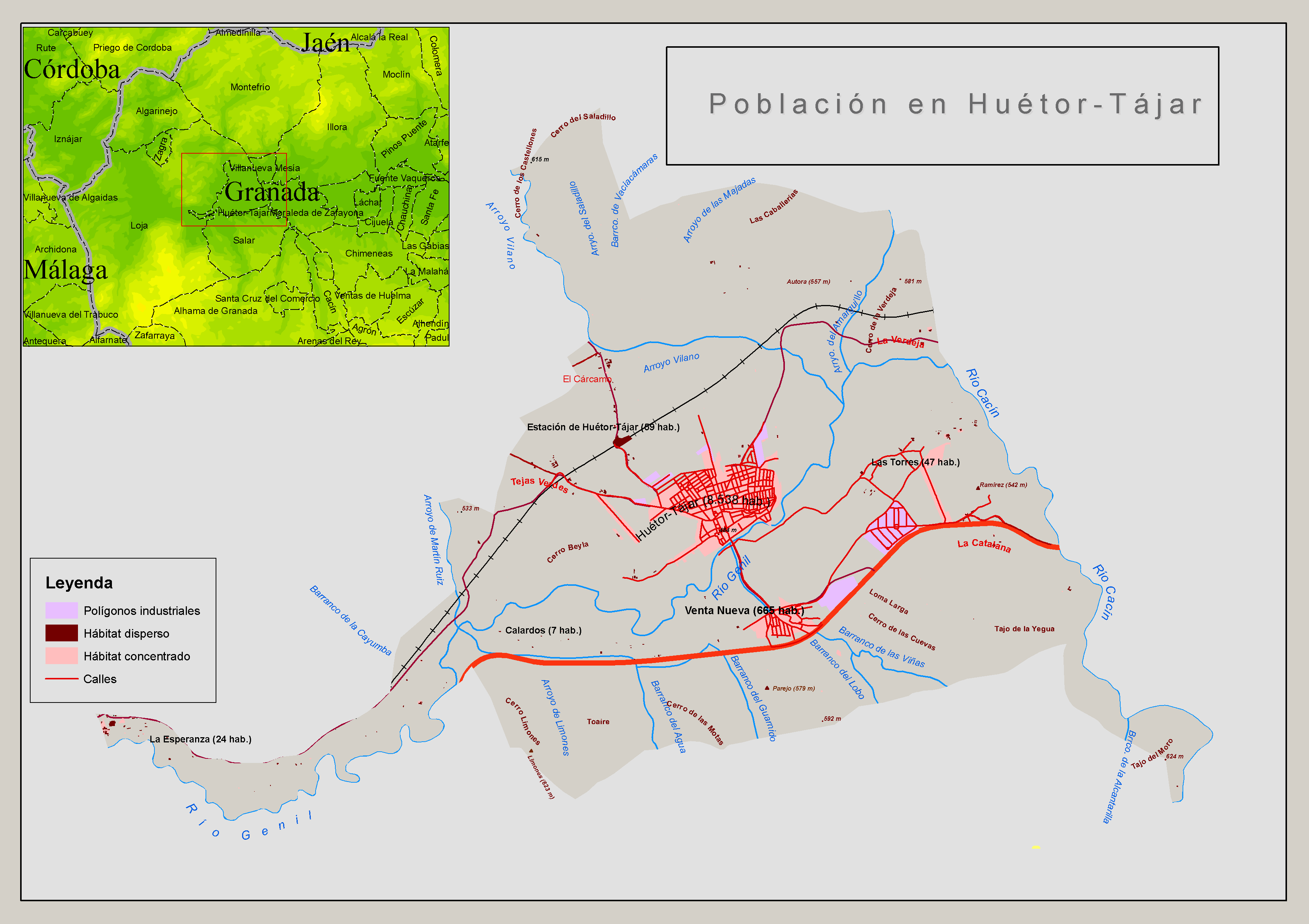 Localización de la población en Huétor-Tájar